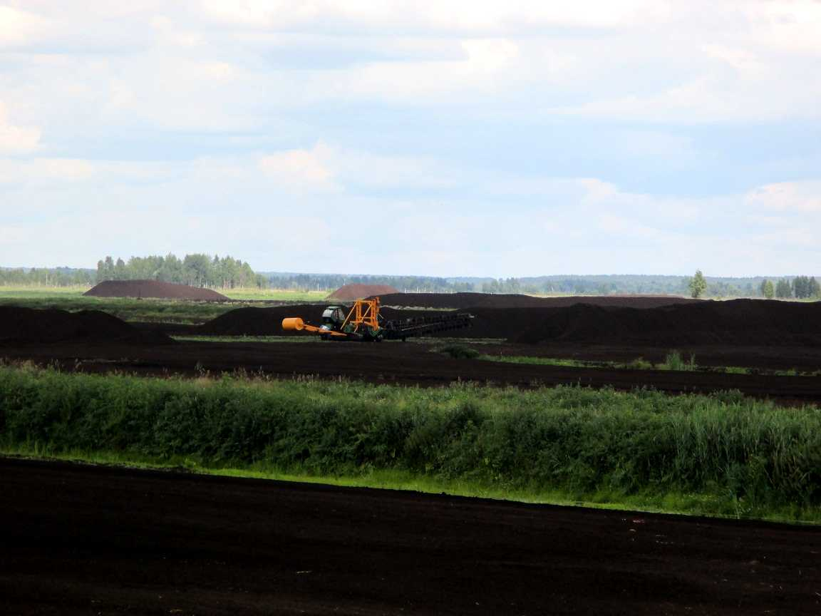 Здабыча торфу, Дакудаўскае балота, Лідскі раён